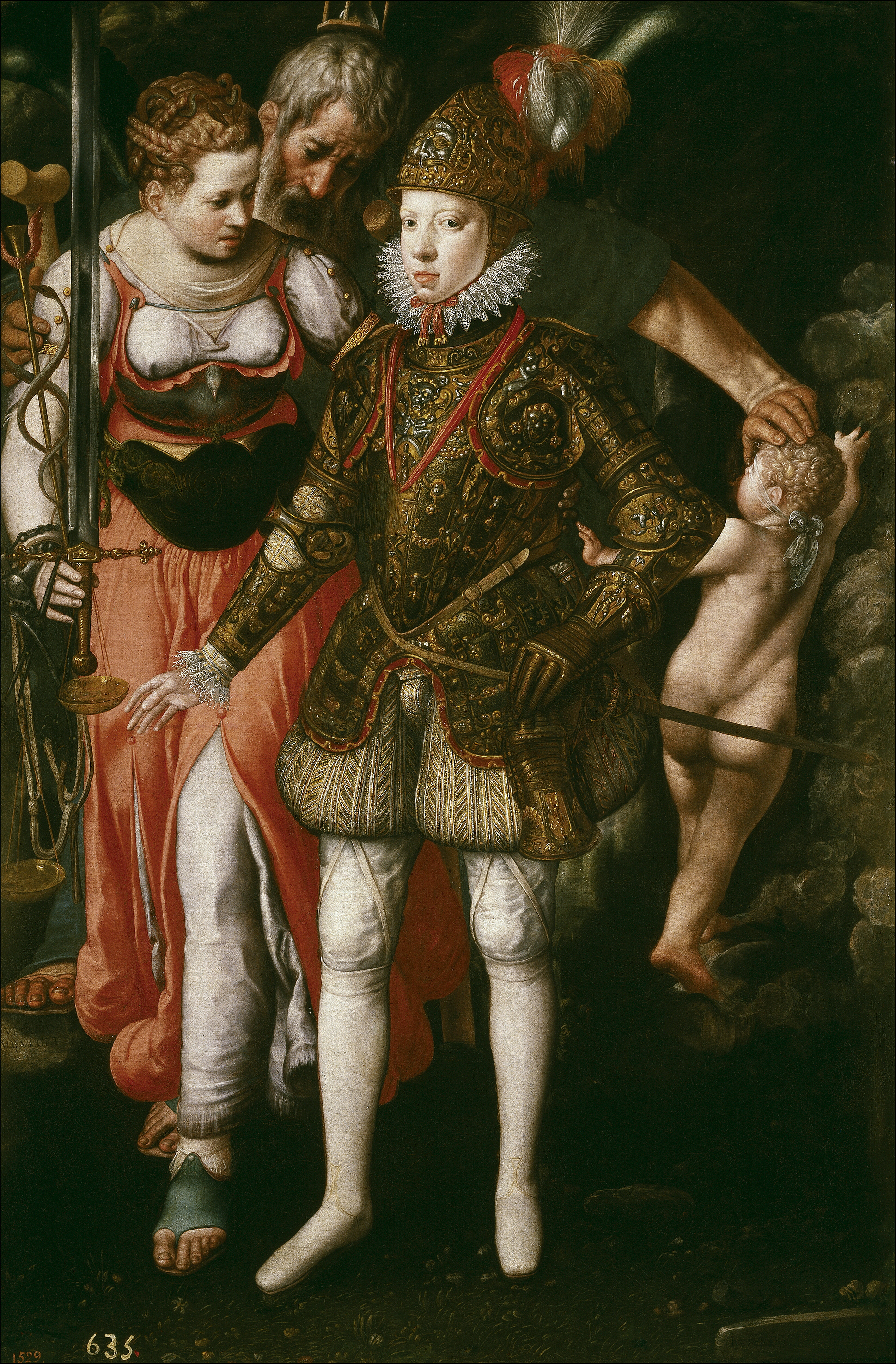 Alegoría de la educación del monarca hispano Felipe III de España